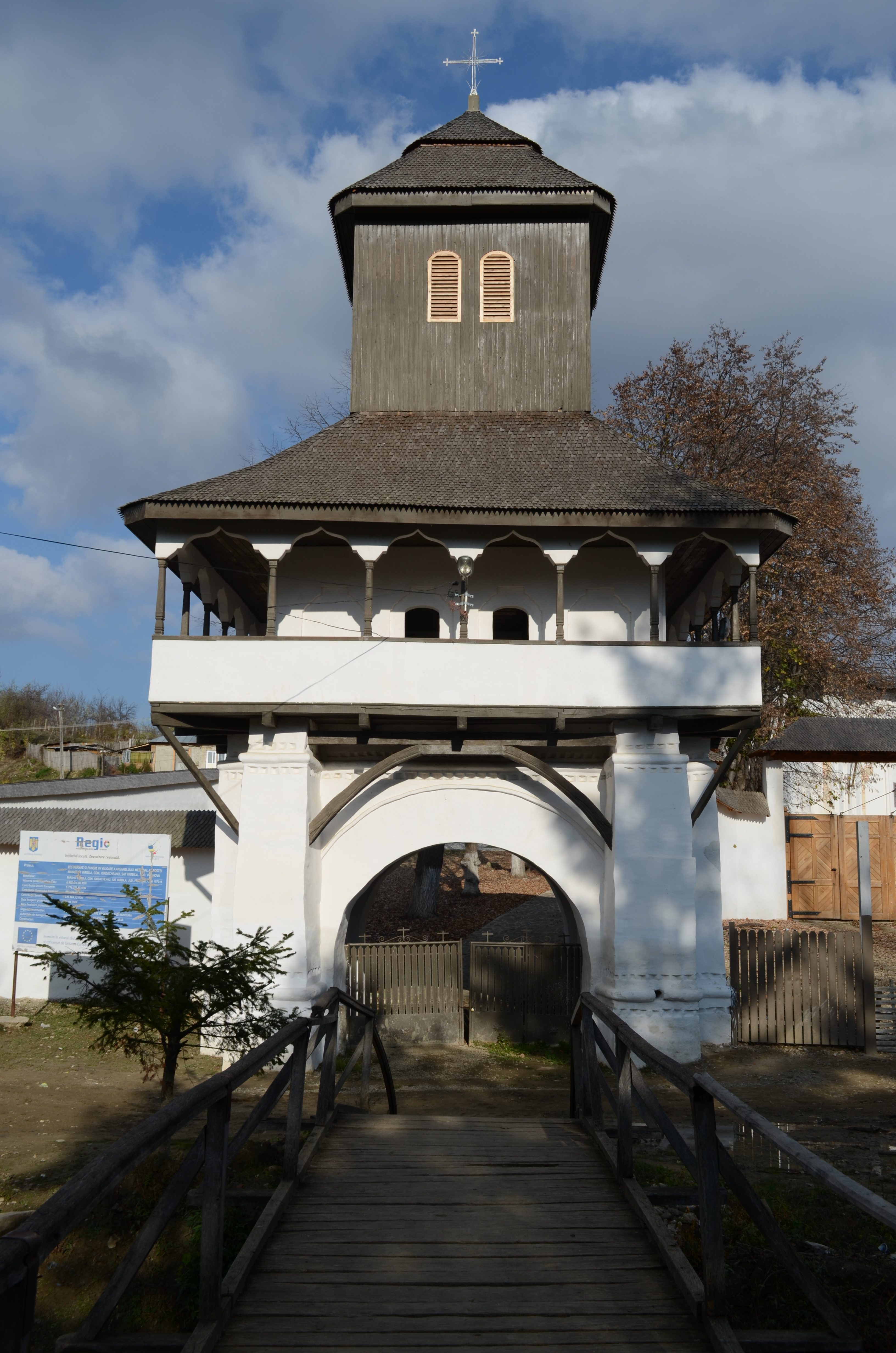 Turn clopotniță, Mănăstirea Vărbila, Prahova 03